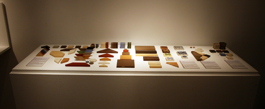 Selección de piezas representativas en la exposición "El Legado Nolla" realizada en el Museo Nacional de Cerámica y Artes Suntuarias "González Martí"